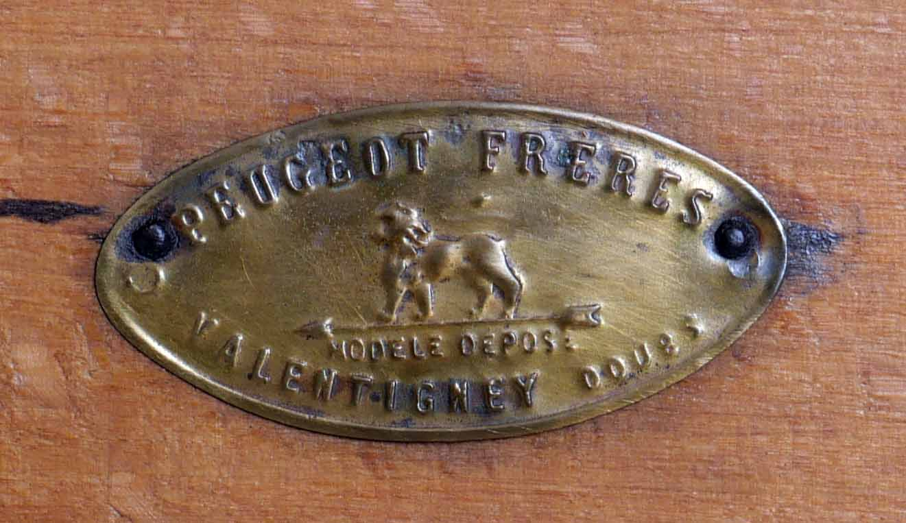 Étiquette en laiton de moulin à poivre Peugeot carré en bois